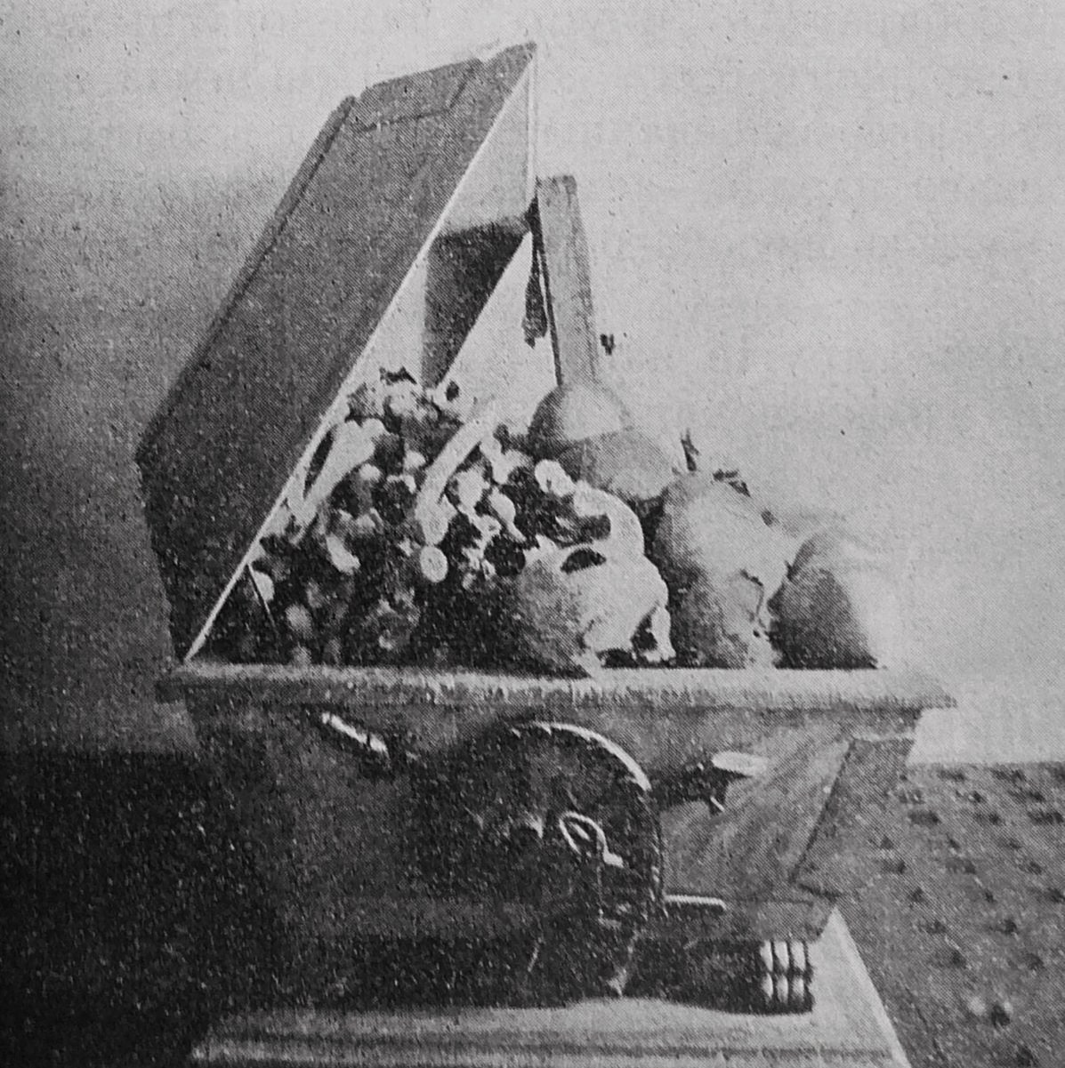 Храм-памятник воинам, павшим при взятии Казани в 1552 году (Храм-памятник в честь Нерукотворе́нного Образа Спасителя) (г. Казань). Гробница с останками павших воинов.